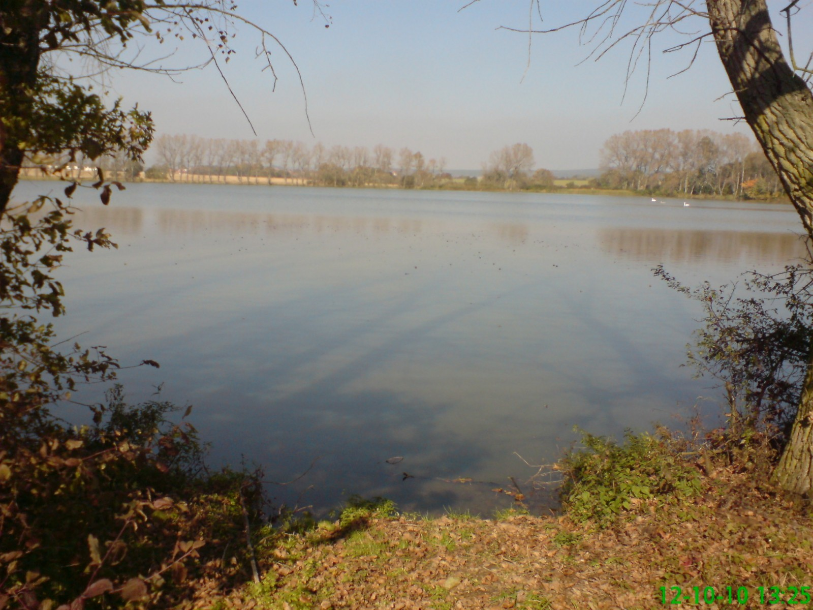 rybník Šingrot